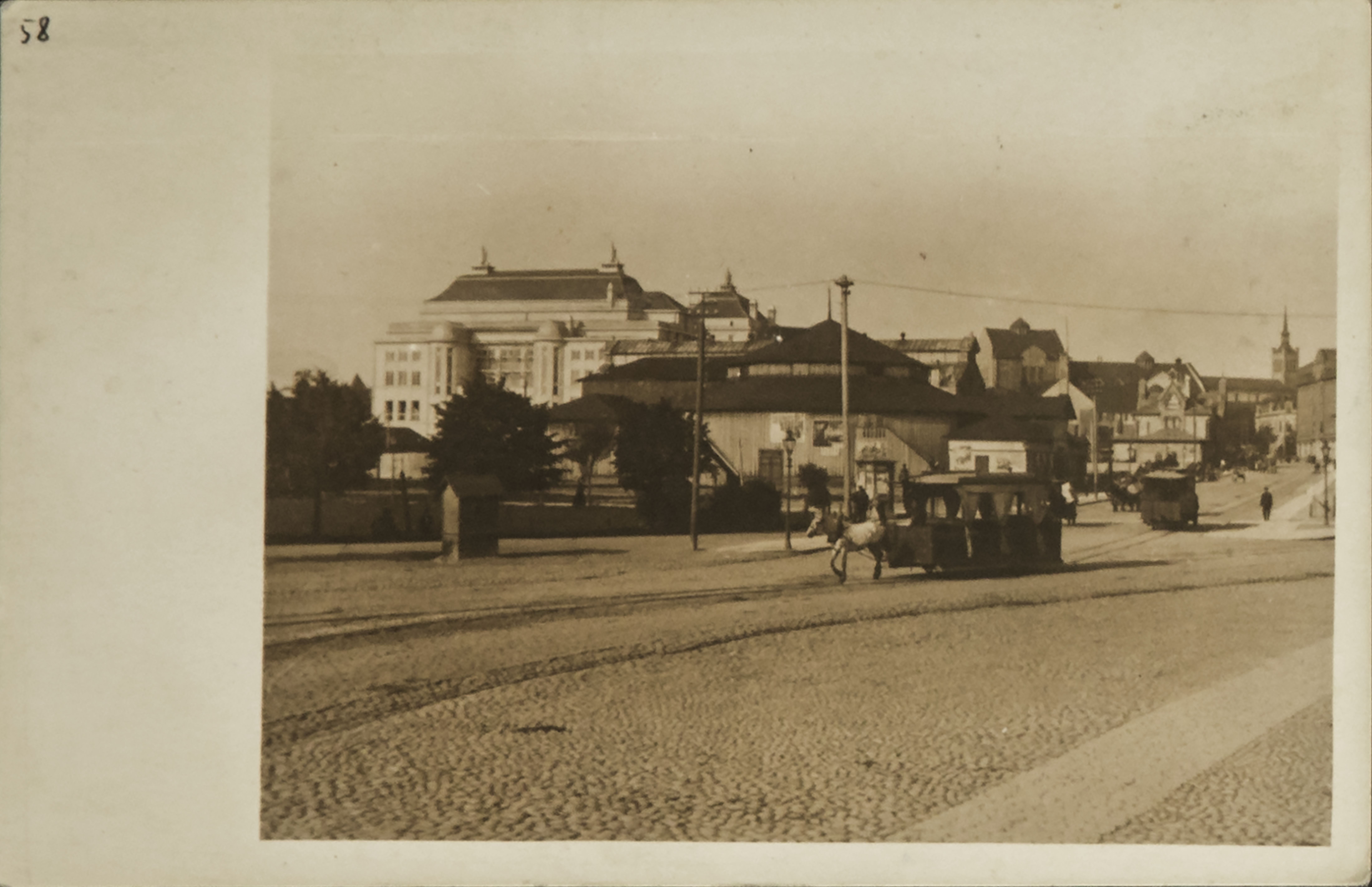 Uus turg, hobutramm. Taamal "Estonia" teater